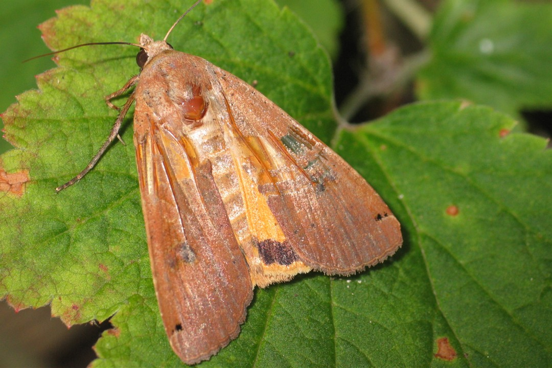 Hausmutter (Noctua pronuba)